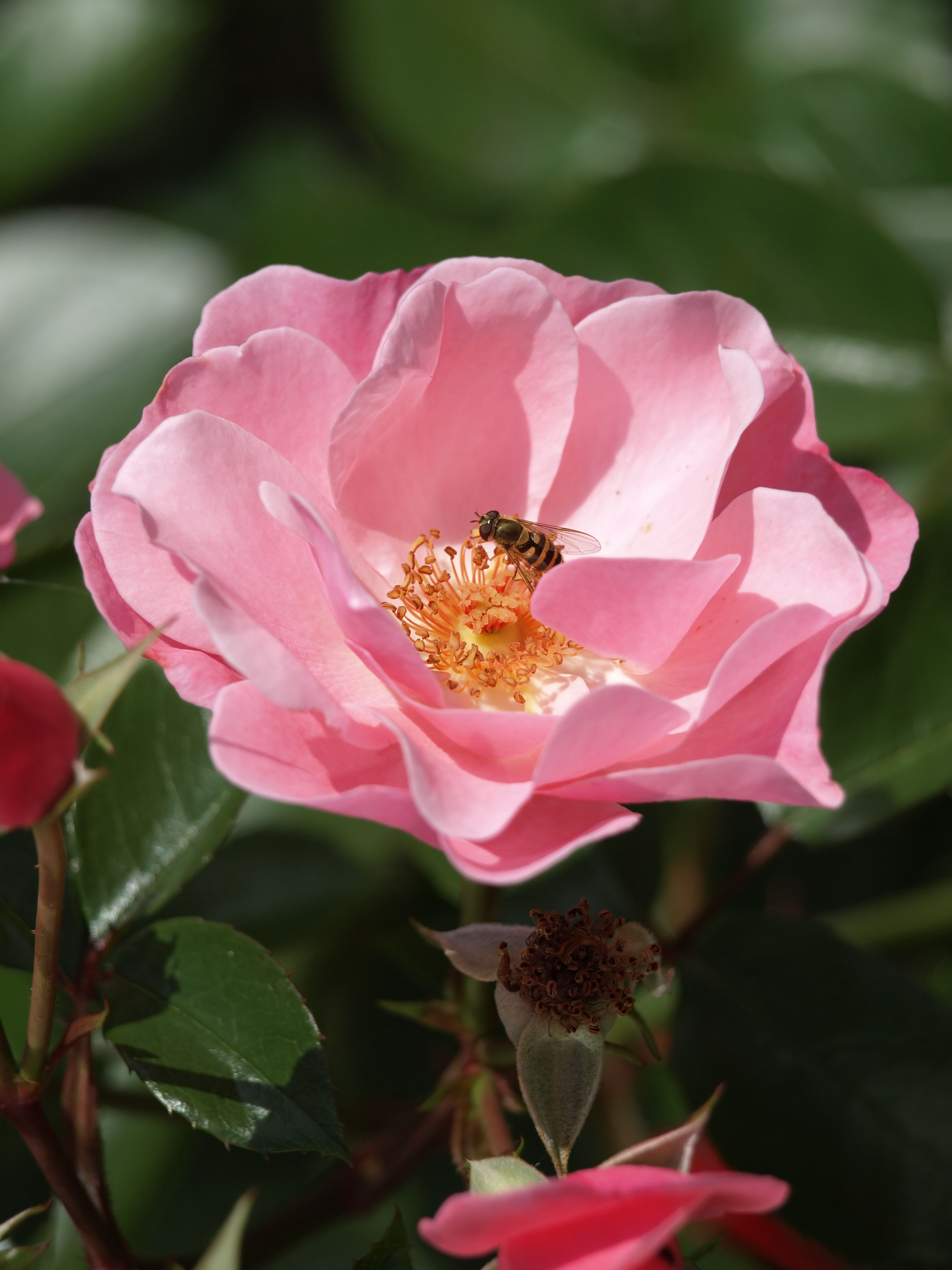 Kulturrose mit einer Schwebfliege